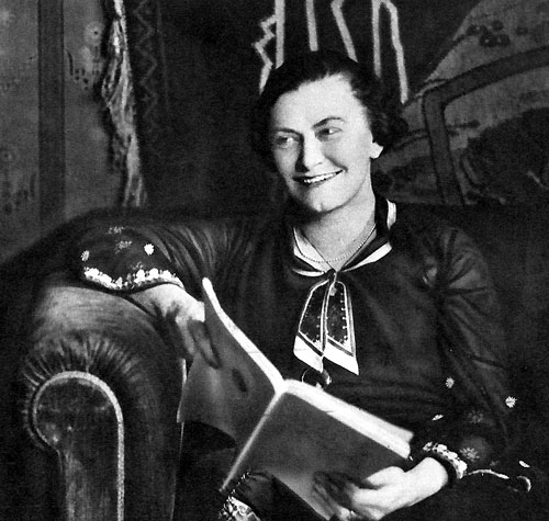 Anna Lenah Elgström